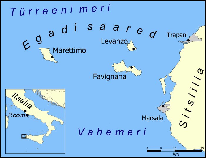 Egadi saarte kaart